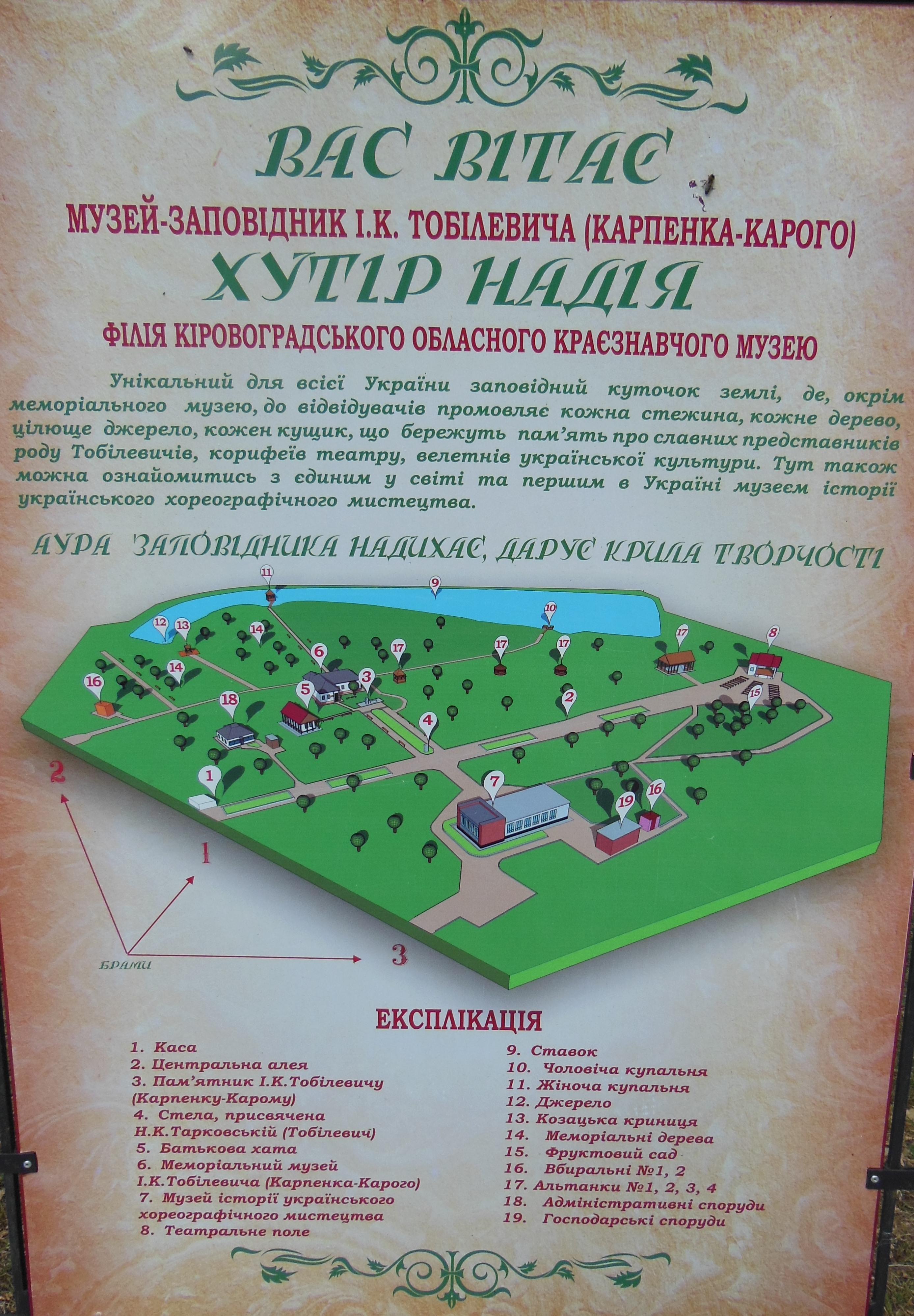 Садиба «Хутір Надія», село Миколаївка, хутір Надія